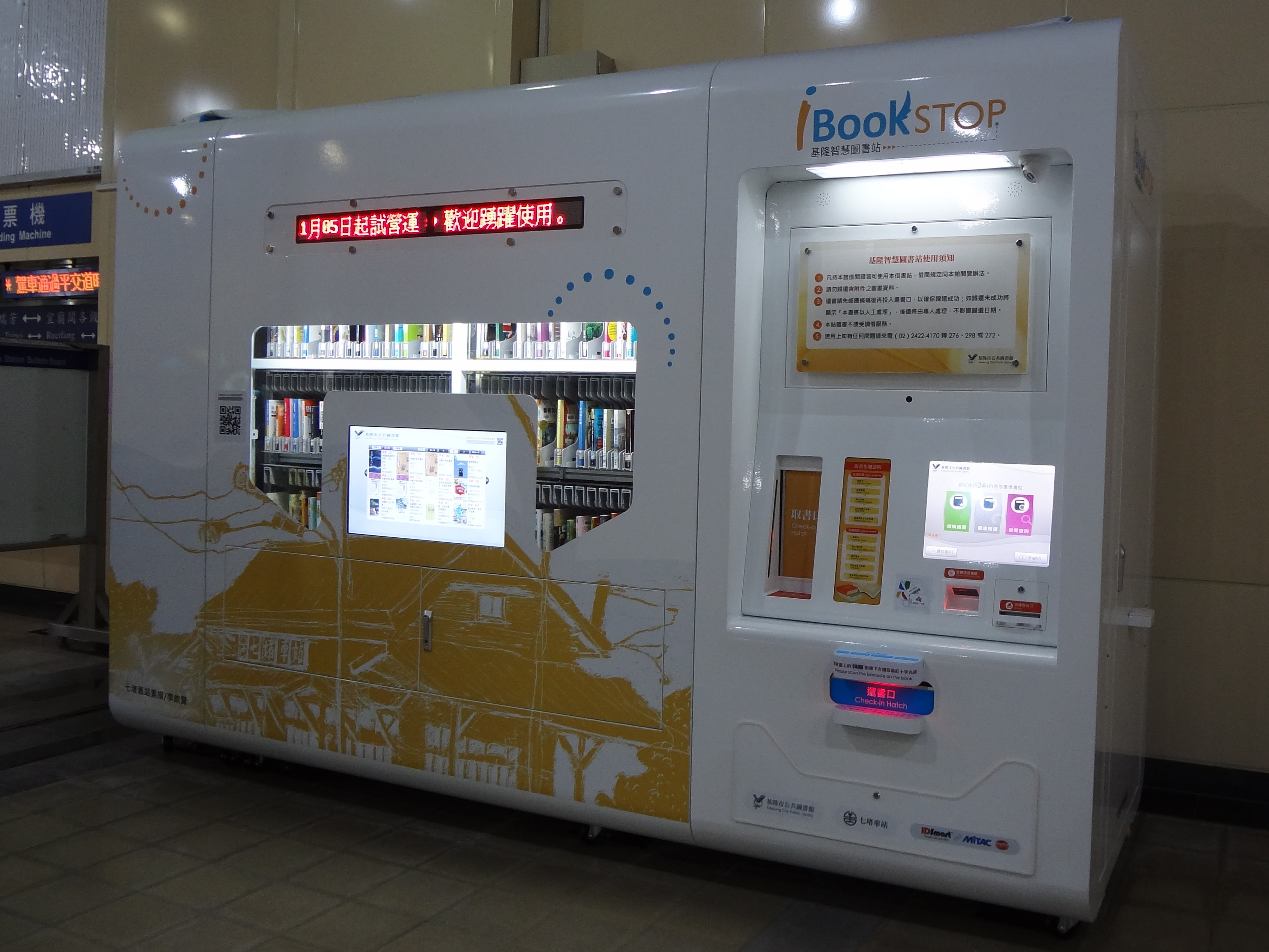 基隆市政府於臺灣鐵路管理局七堵車站1樓設置的基隆智慧圖書站，2016年11月5日開始試營運。